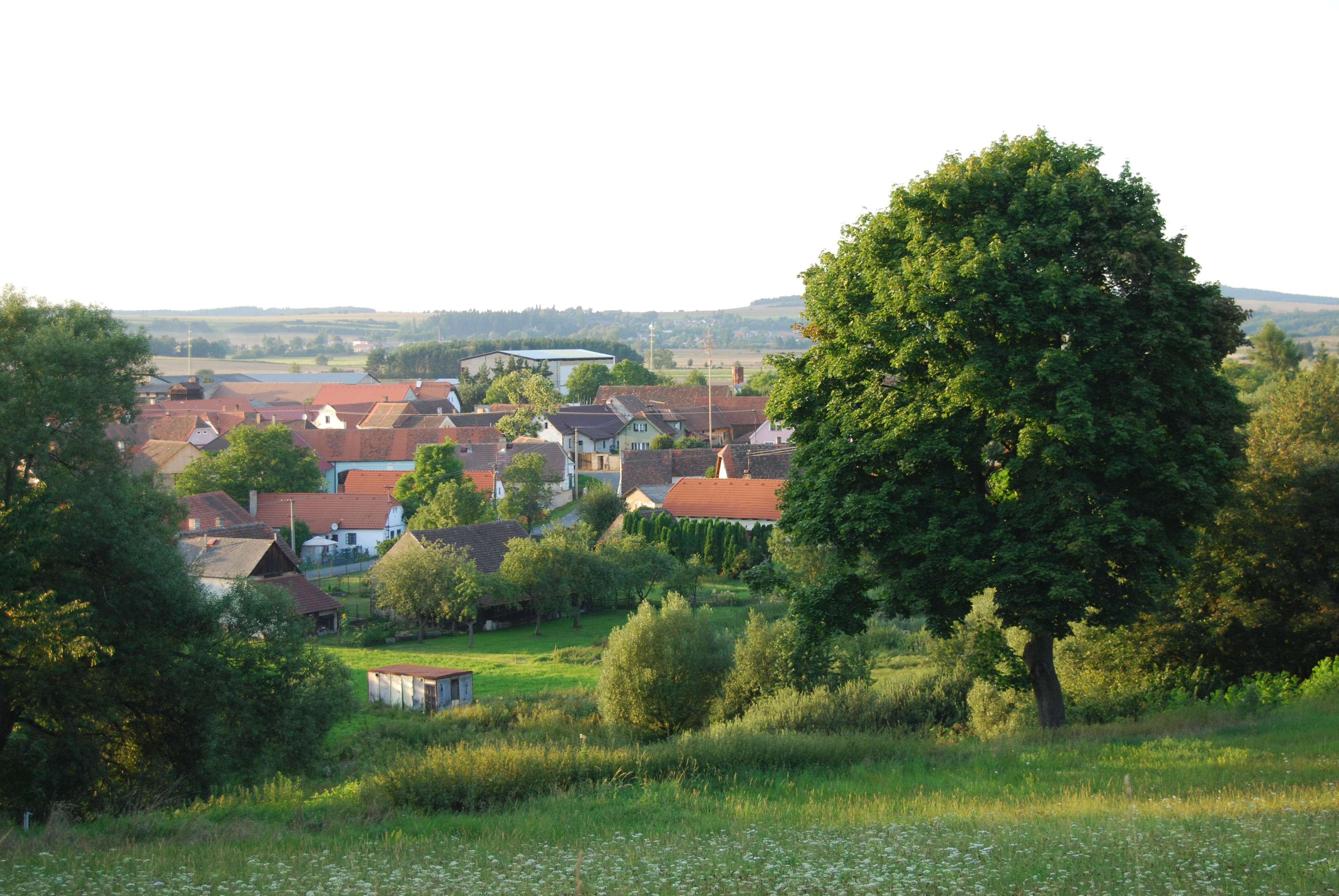 Pohled na obec od vrchu Homole a z přístupové cesty k božím mukám. Lety (okres Písek). Česká republika.